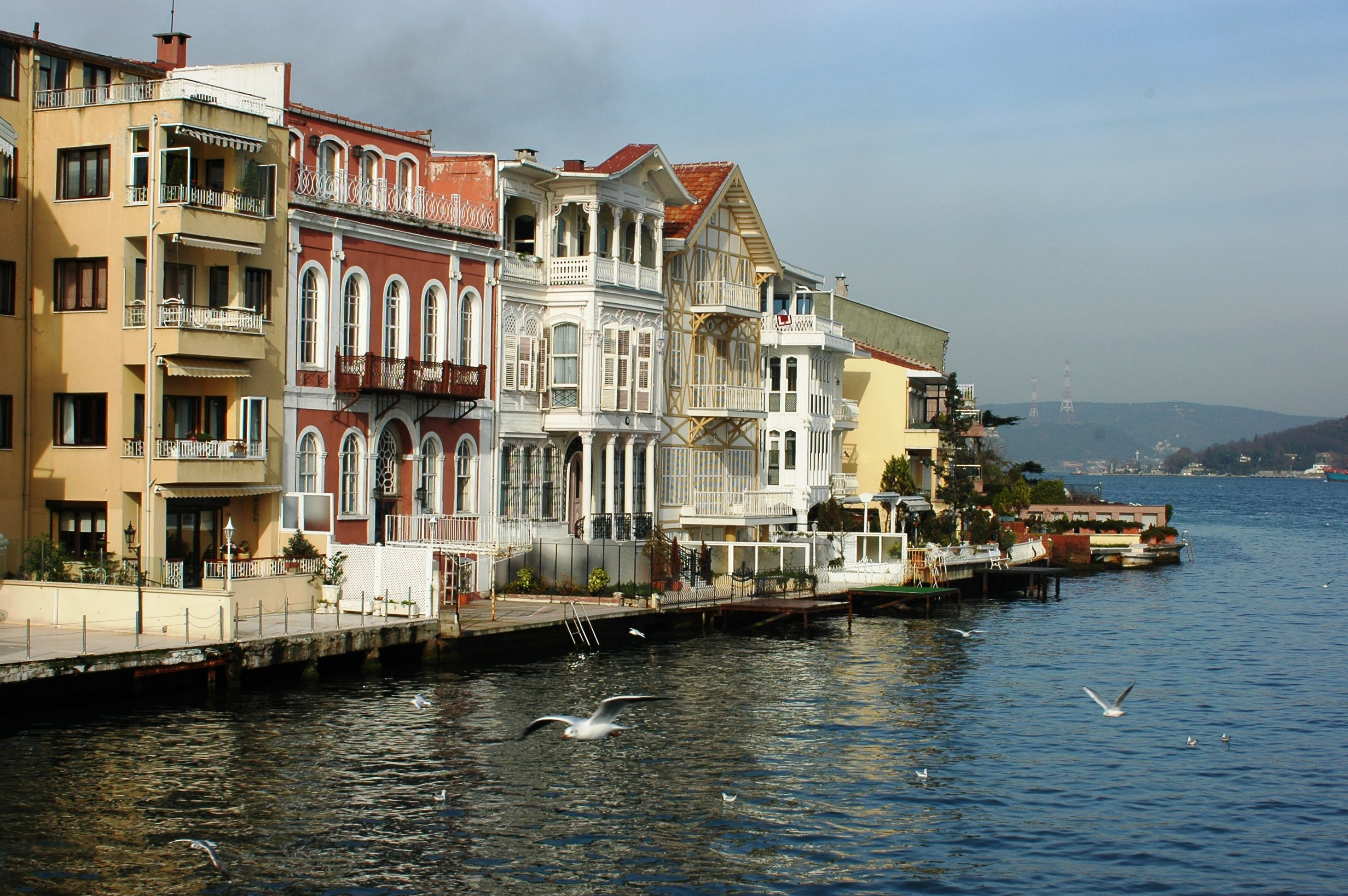 Istanbul - Yeniköy